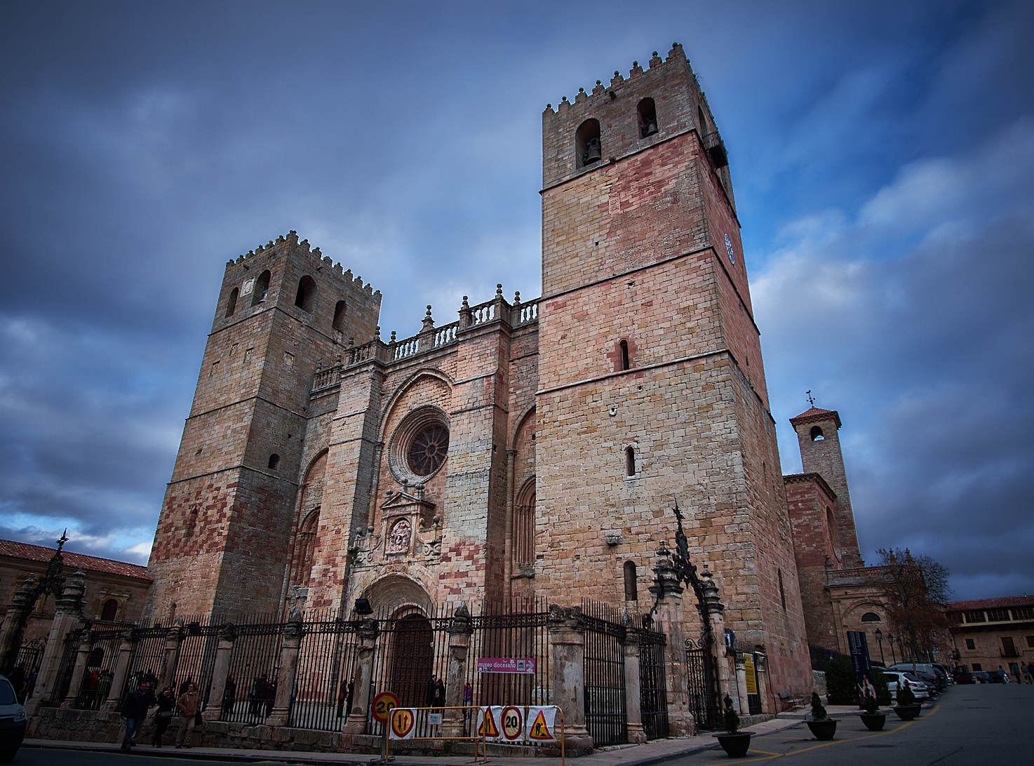 Guadalajara, Spain